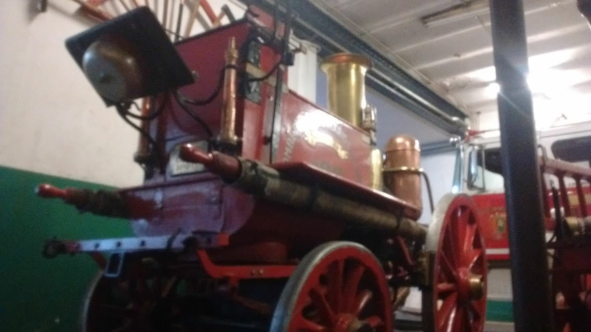 Primer autobomba del cuartel de Bomberos Voluntarios de La Boca. De tracción a caballo. Año 1884